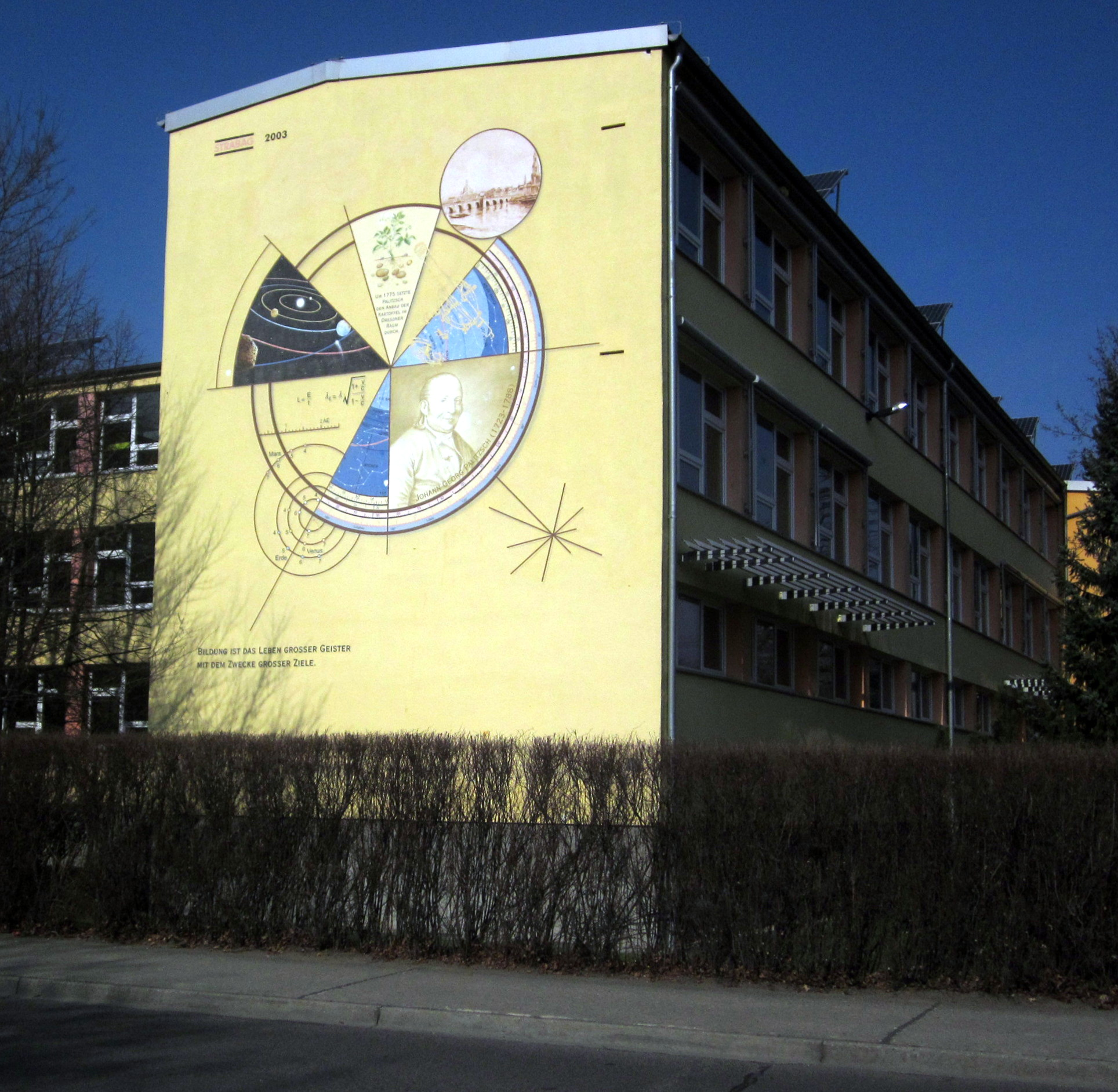 Dresden Prohlis Johann-Georg-Palitzsch-Schule Wandbild Atelier Gersdorf